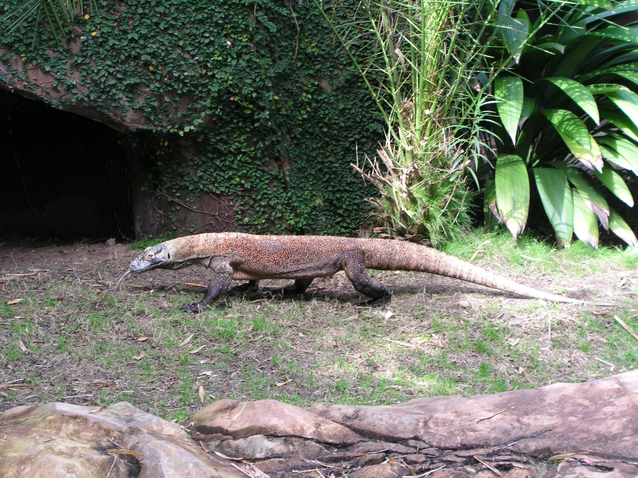 Varanus komodoensisBig Lizard